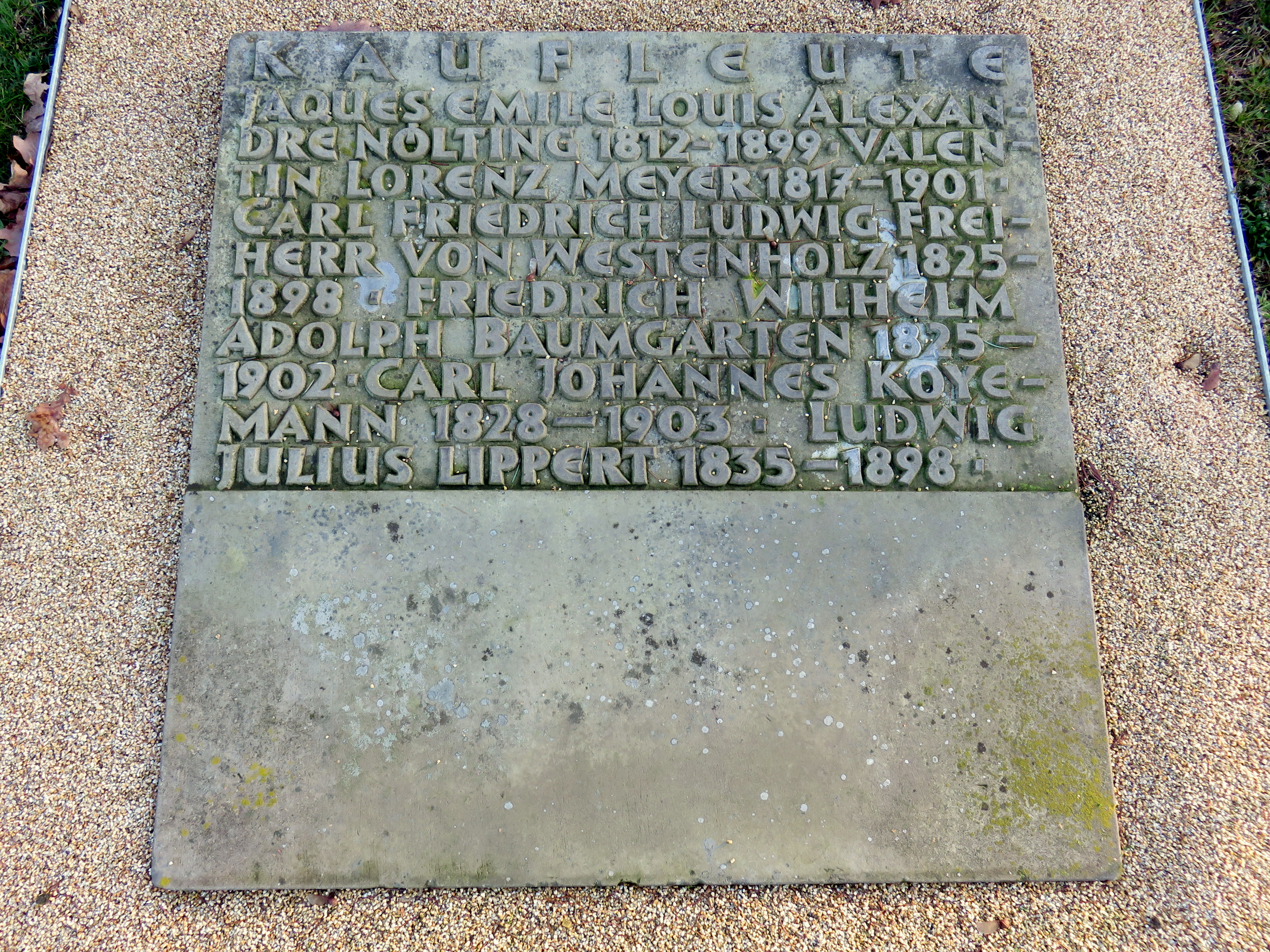 Sammelgrabplatte Kaufleute (II f) im Bereich des Althamburgischen Gedächtnisfriedhofs auf dem Hamburger Friedhof Ohlsdorf, zu Ehren von unter anderen Emile Nölting, Valentin Lorenz Meyer, Carl Johannes Koyemann.